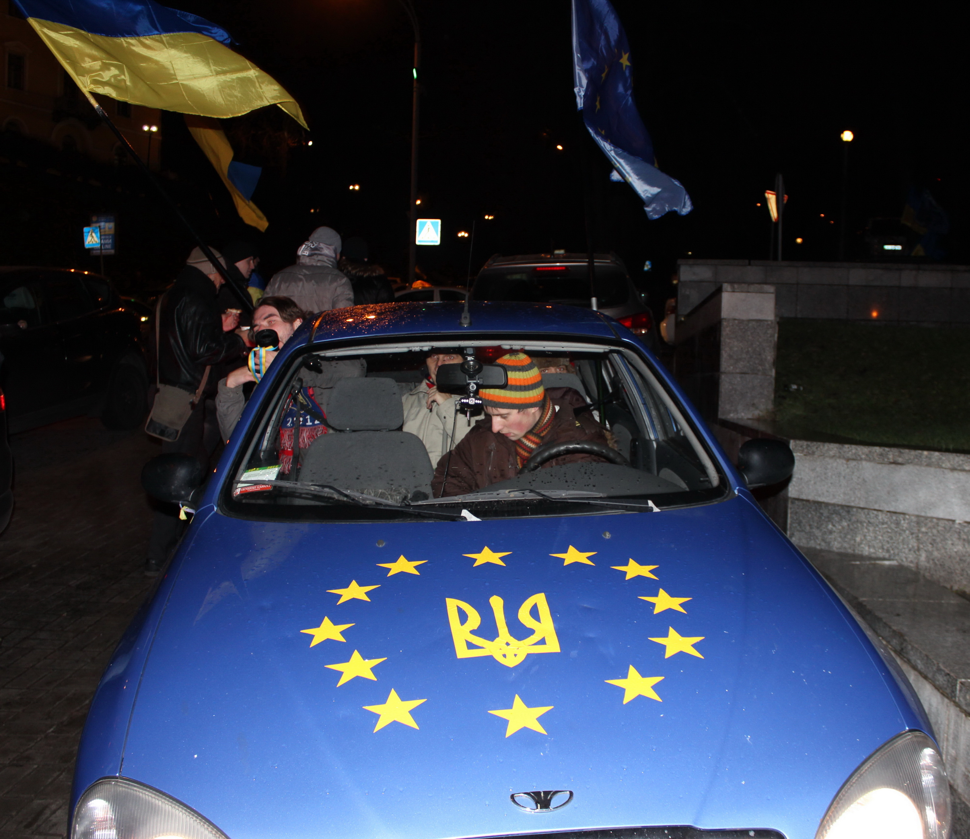 Актуальний тюнінг.